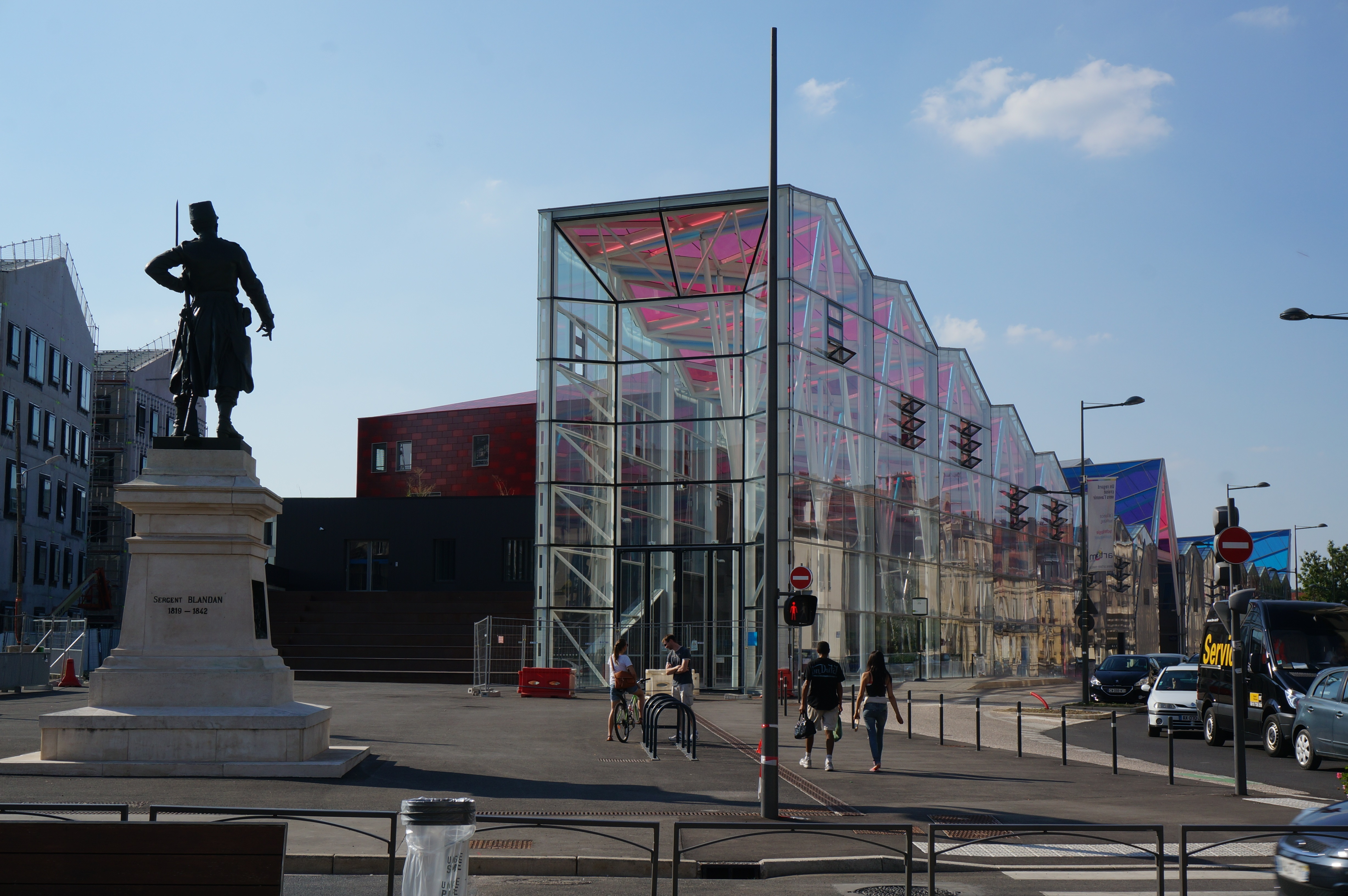 Angle rue du Sergent Blandan et avenue Leclerc, le staue et les bâtiments Artem.